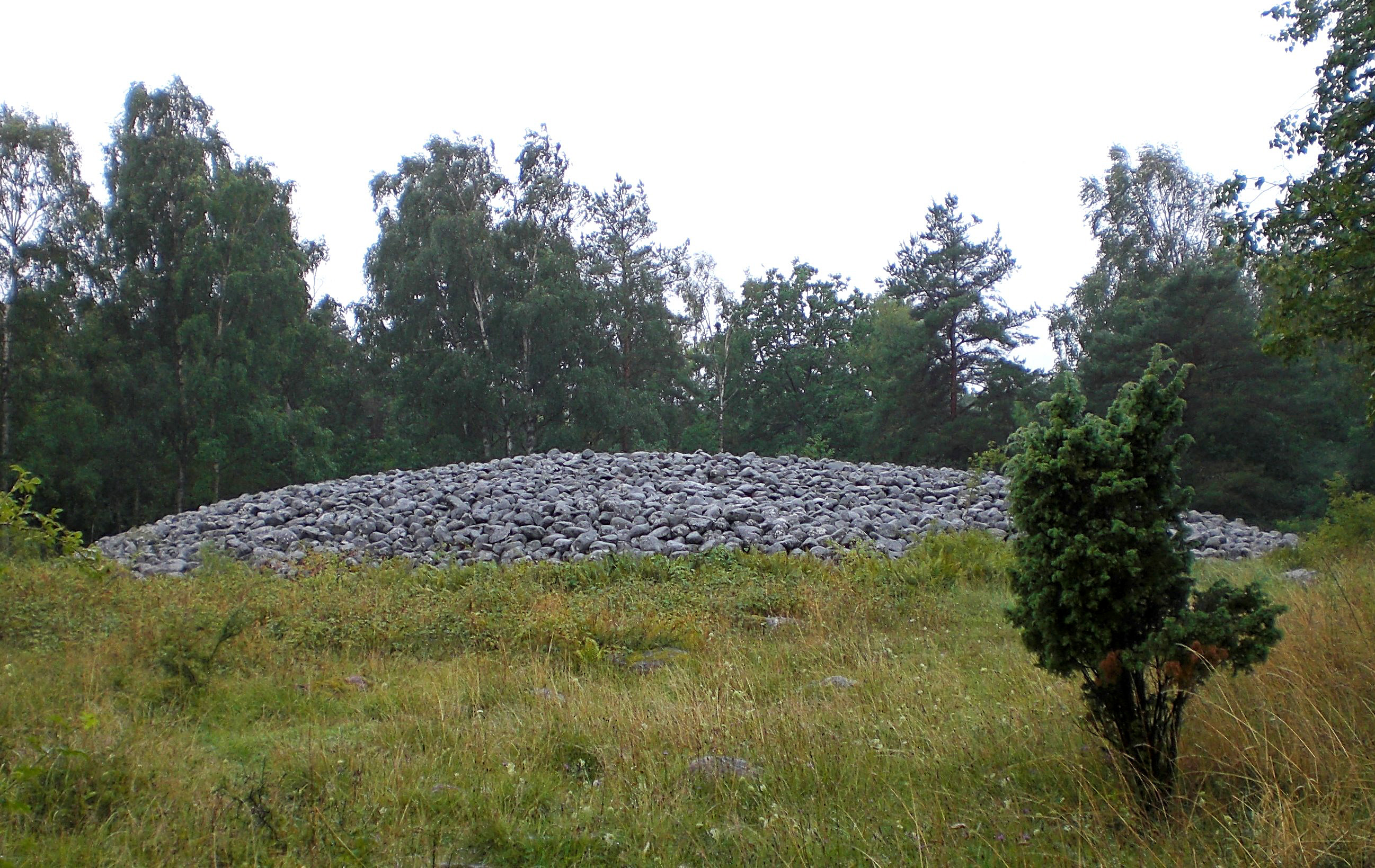 Bla rör, bronzezeitliches Grab bei Borgholm, Öland, Schweden